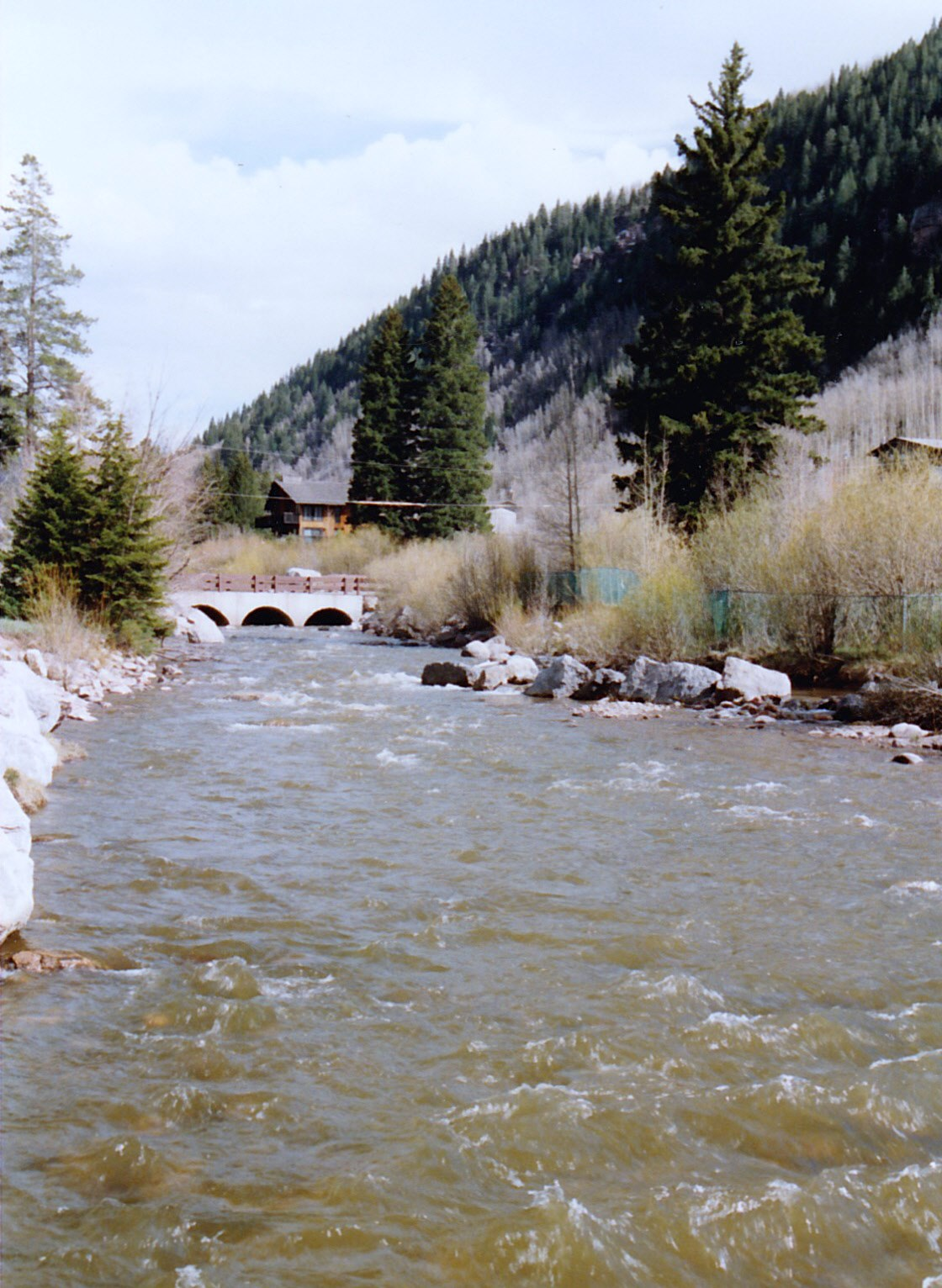 Vermont,USA.